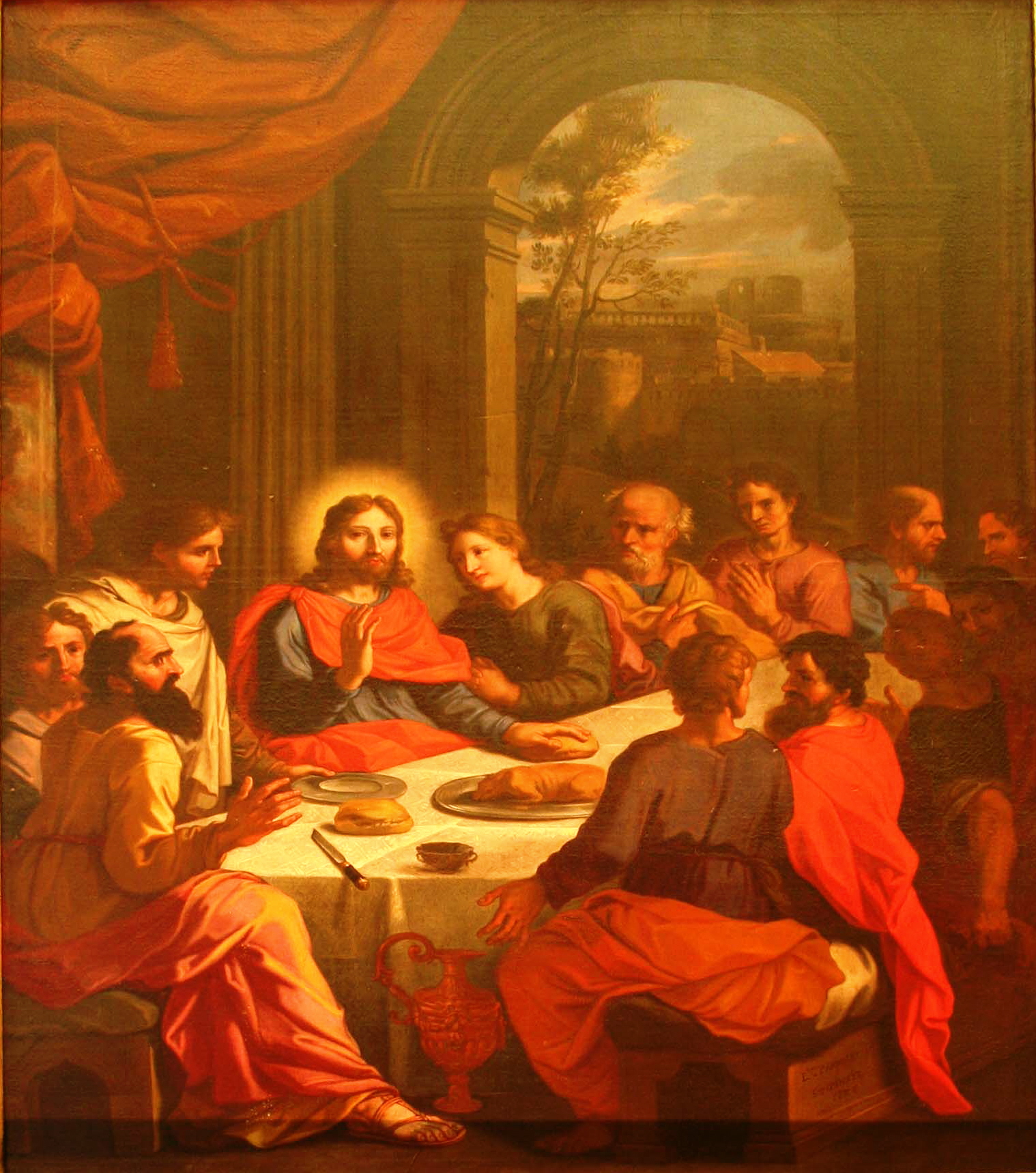 Tableau de Louis Parrocel (1634-1694) représentant la Cène dans la cathédrale de Cavaillon.